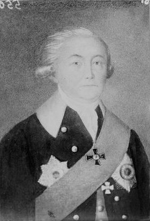 Густав (Густав-Эрнст) Густавович фон Штрандман (1742—1803)